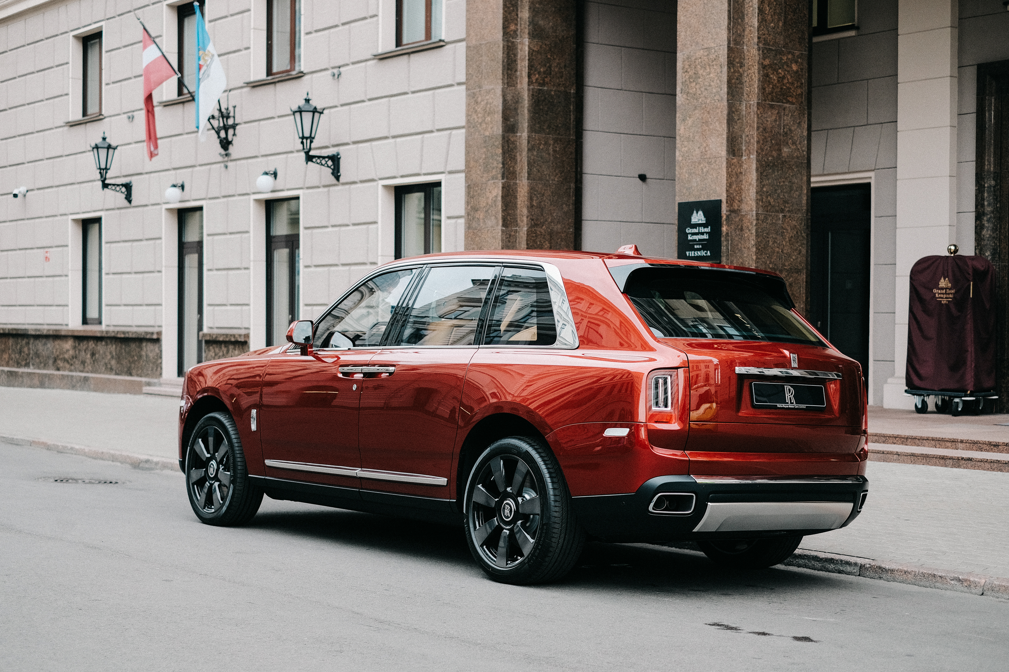 Riga